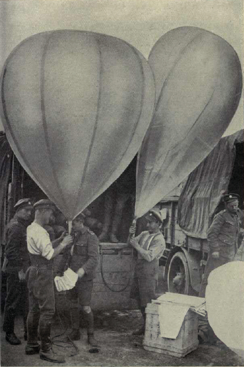 1.Weltkrieg, britische Flugblätter